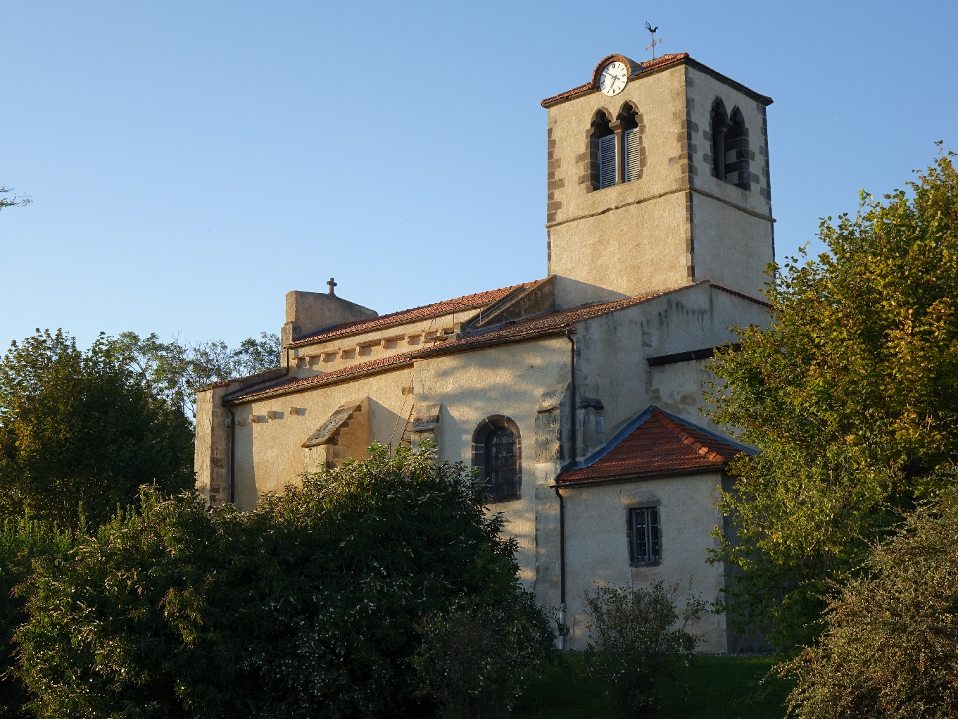 Église Saint-André de Saint-André-le-Coq